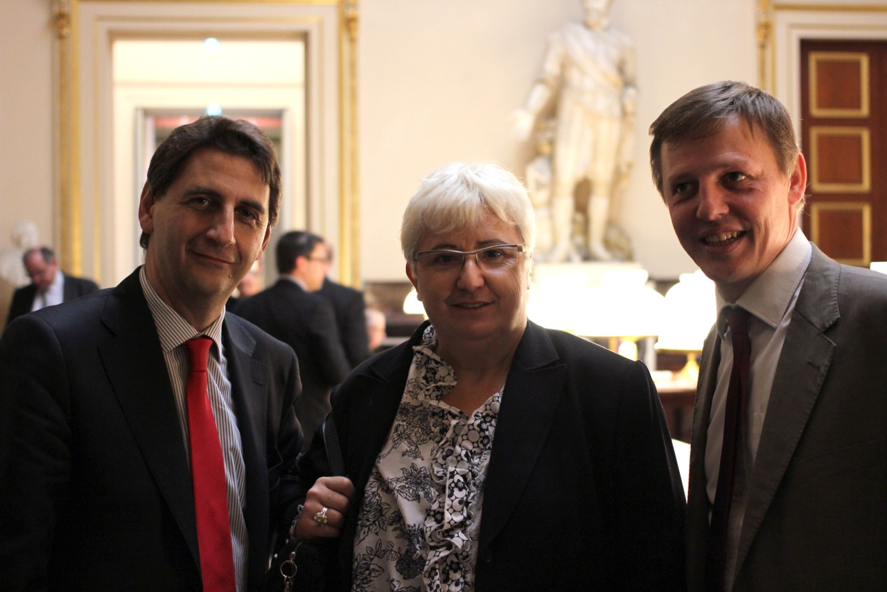 Le député de Seine-Saint-Denis Daniel Goldberg avec la députée de Seine-Saint-Denis Élisabeth Pochon et son suppléant Raphaël Bouton, à l'Assemblée nationale.